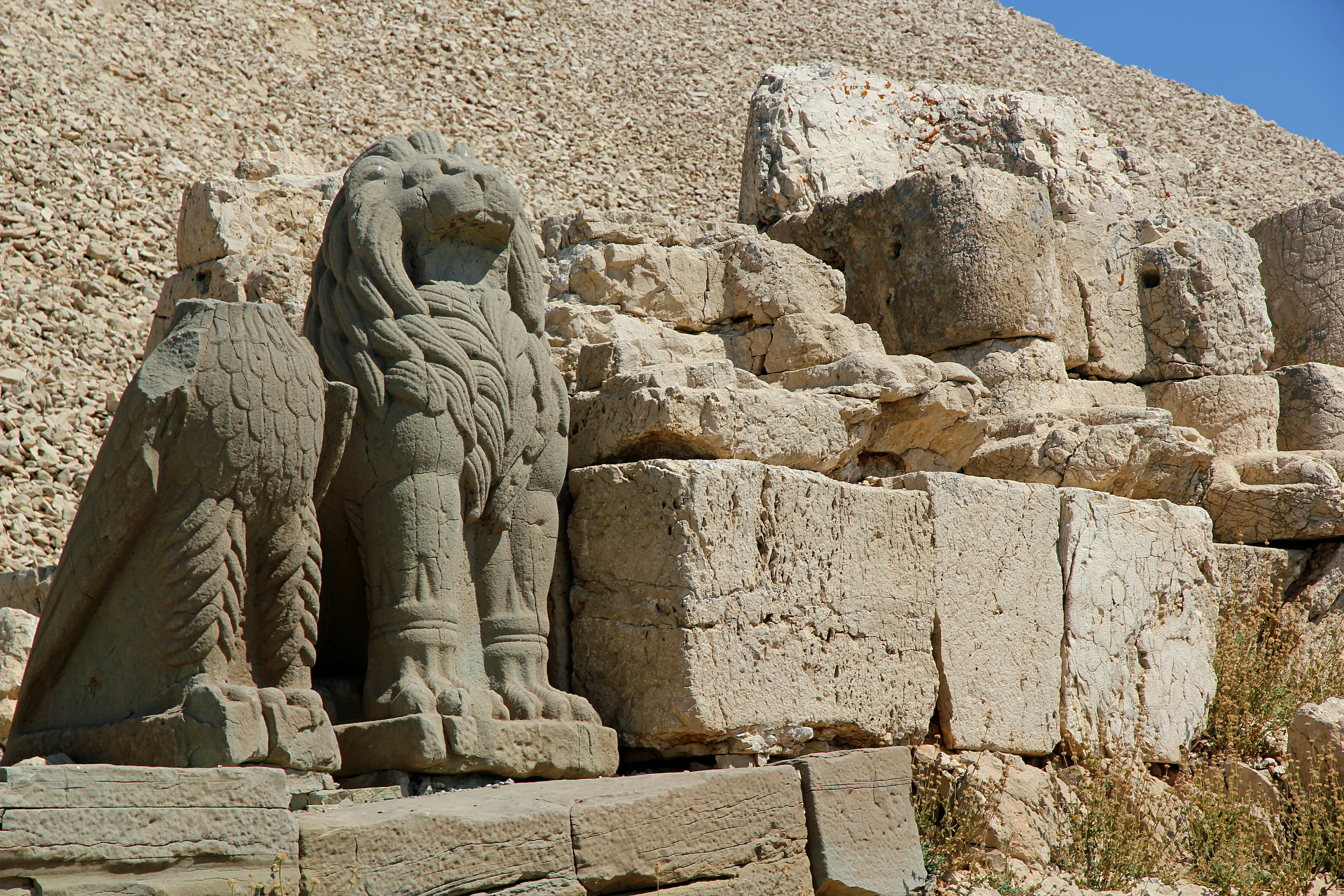 Löwe und Adler der Dexiosis-Reihe, rechts daneben Sockel der Monumentalstatuen von Löwe und Adler, Nemrut Dağı, Südosttürkei, Westterrasse